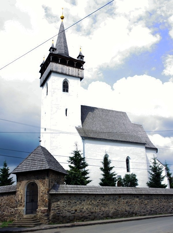 Реформатская церковь в Хусте